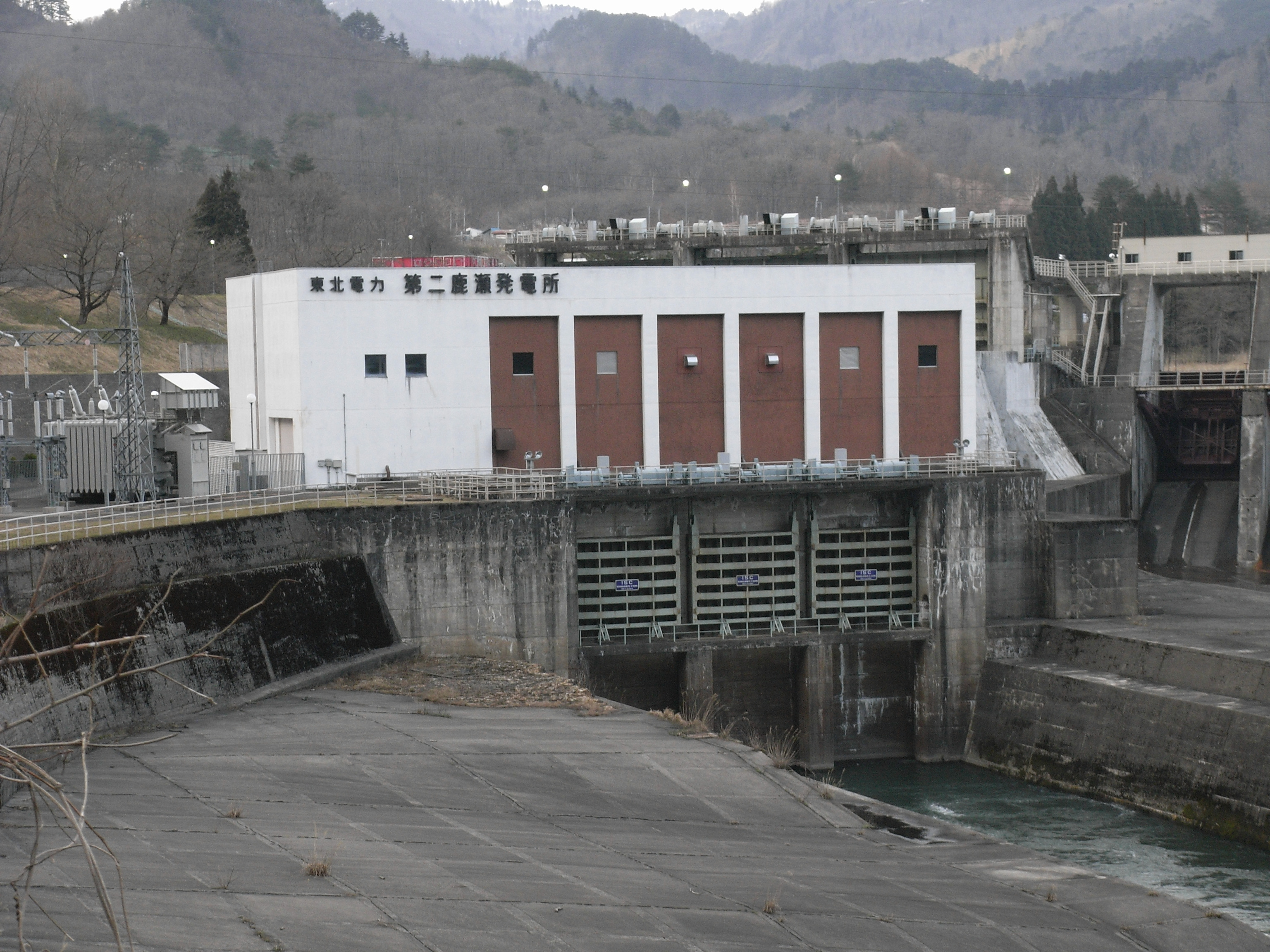 power station